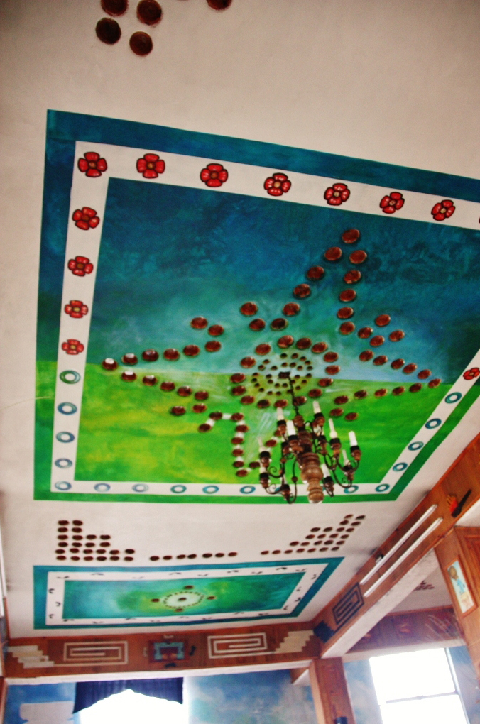 La Barca de la Fé, Templo Parroquial de San Andrés Buenavista, Tlaxco, Tlaxcala, México